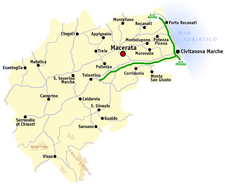 Kaart van de provincie Macerata